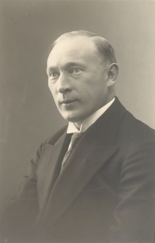 Hermann Jaakson, eesti matemaatik